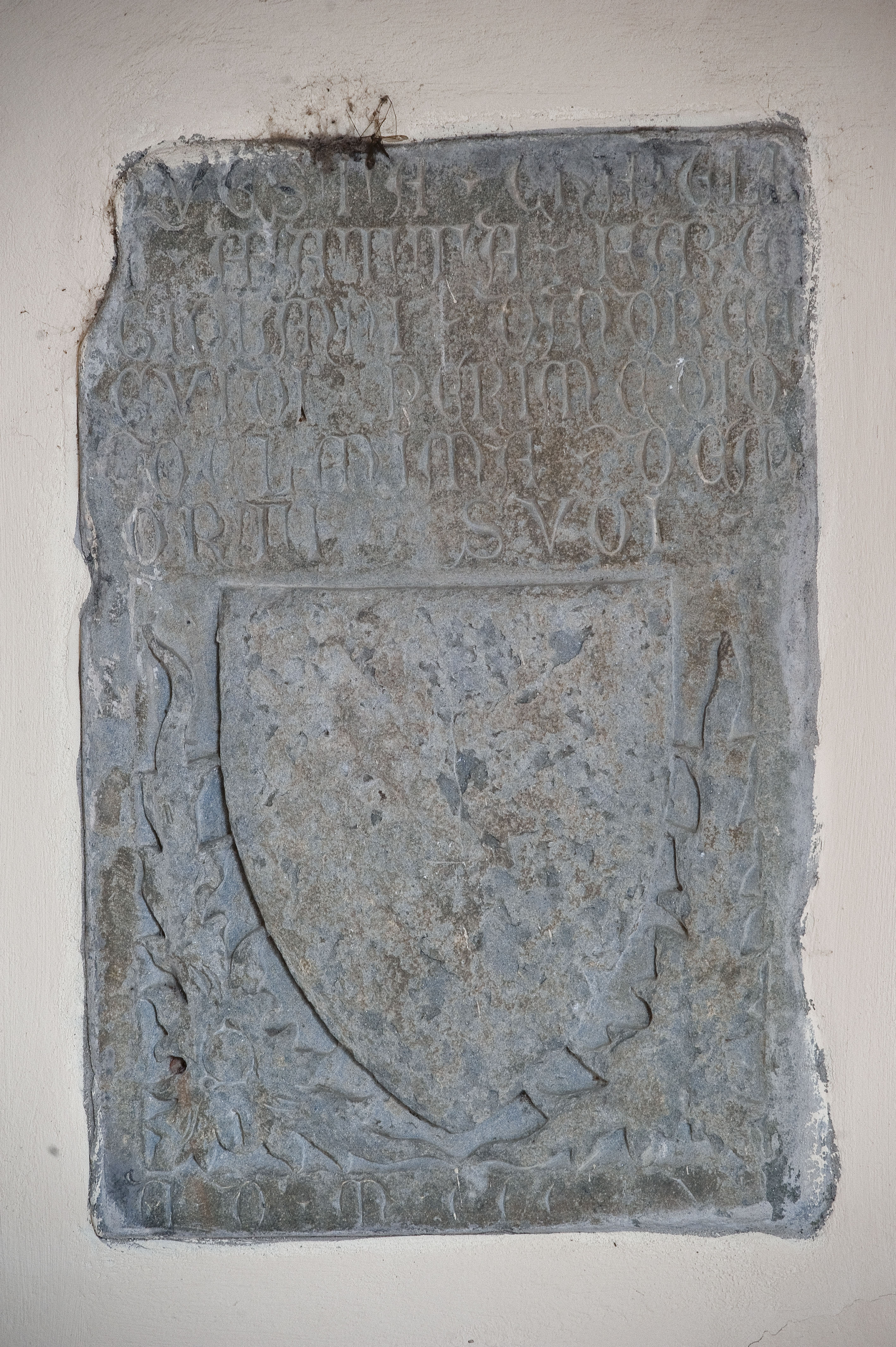 Stemma nobiliare del XIV secolo originariamente usato come lapide sepolcrale e oggi collocato nel nartece della chiesa di Sant'Andrea a Candeli (Bagno a Ripoli)